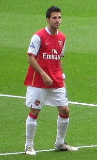 Francesc Fàbregas